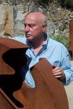 Juan Moral. Escultor.